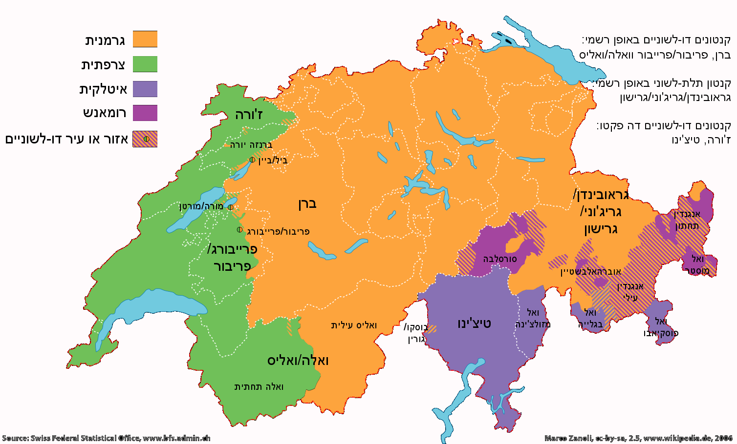 שפות שוויץ